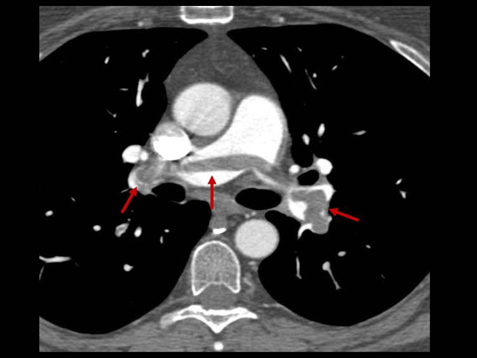 Tomodensitométrie (scanner) avec contraste iodé intraveineux, démontrant une embolie dans les artères pulmonaires centrales (embolie dite en selle).